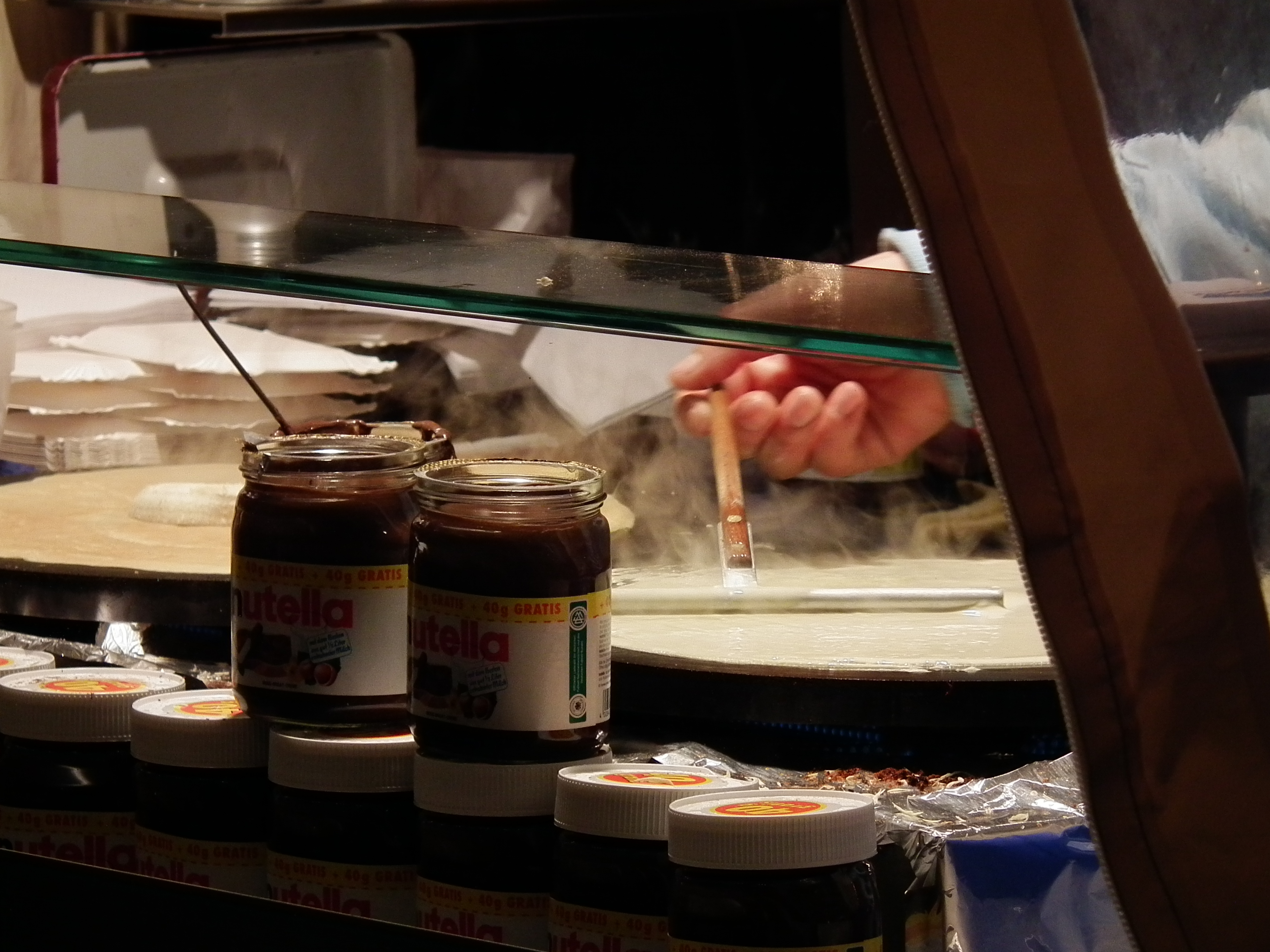 Herstellung von Crêpes